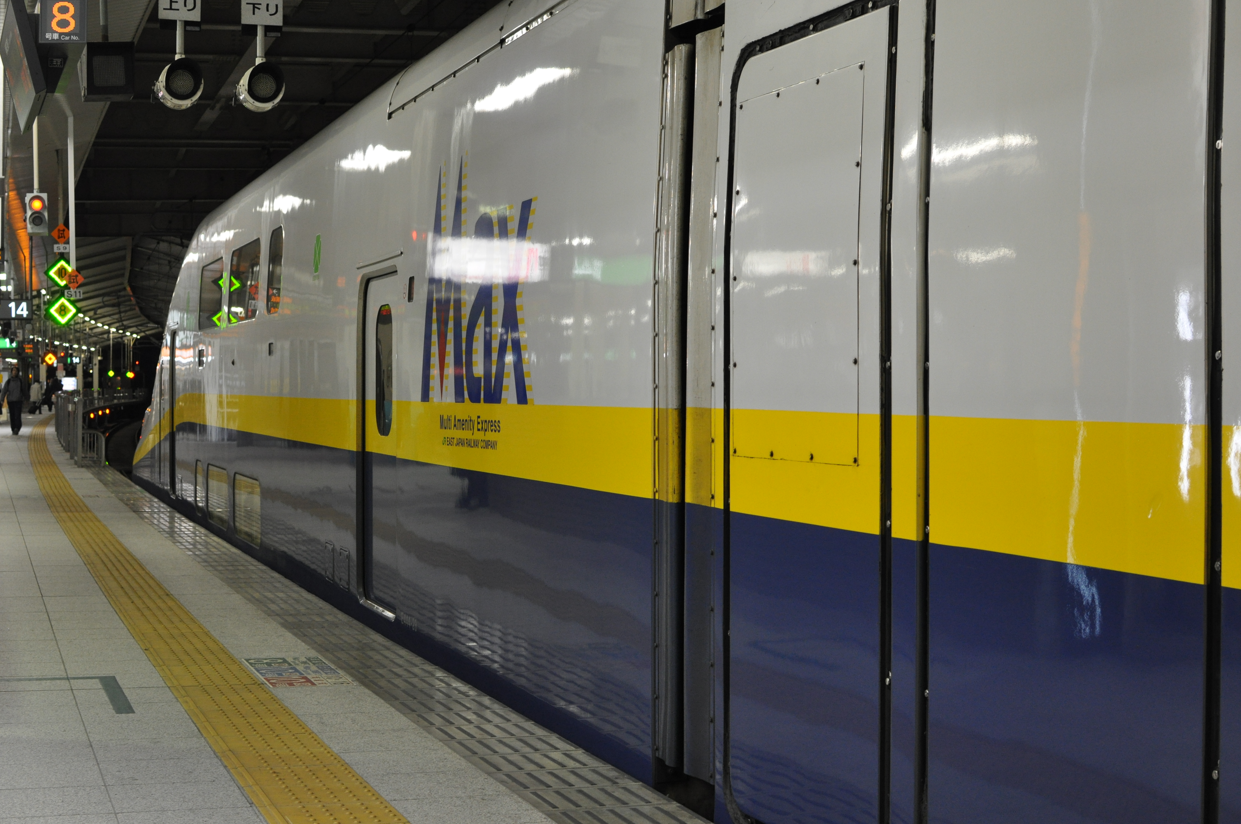 JR東日本, 東北新幹線E4系 仙台駅(Sendai Station)